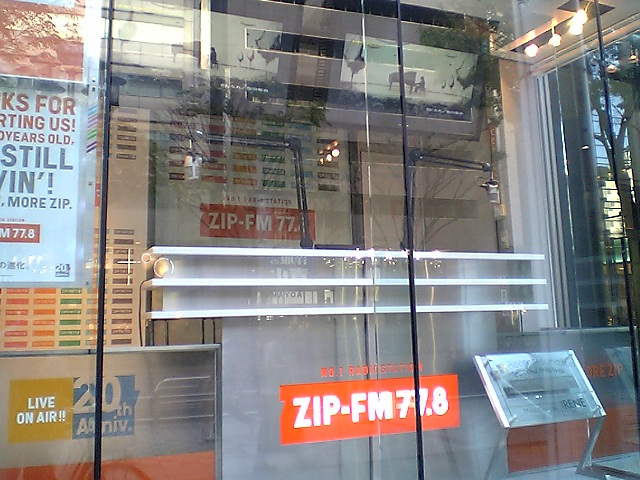 栄、LACHICにある、ZIP-FMの公開生放送用スタジオです。